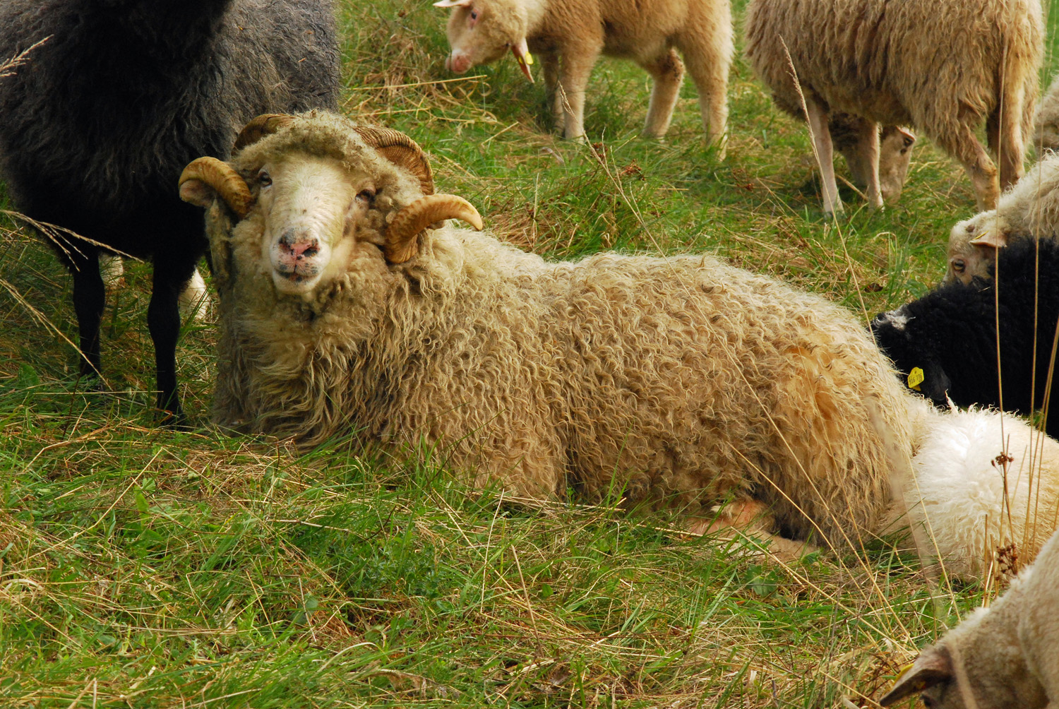 Waldschafwidder